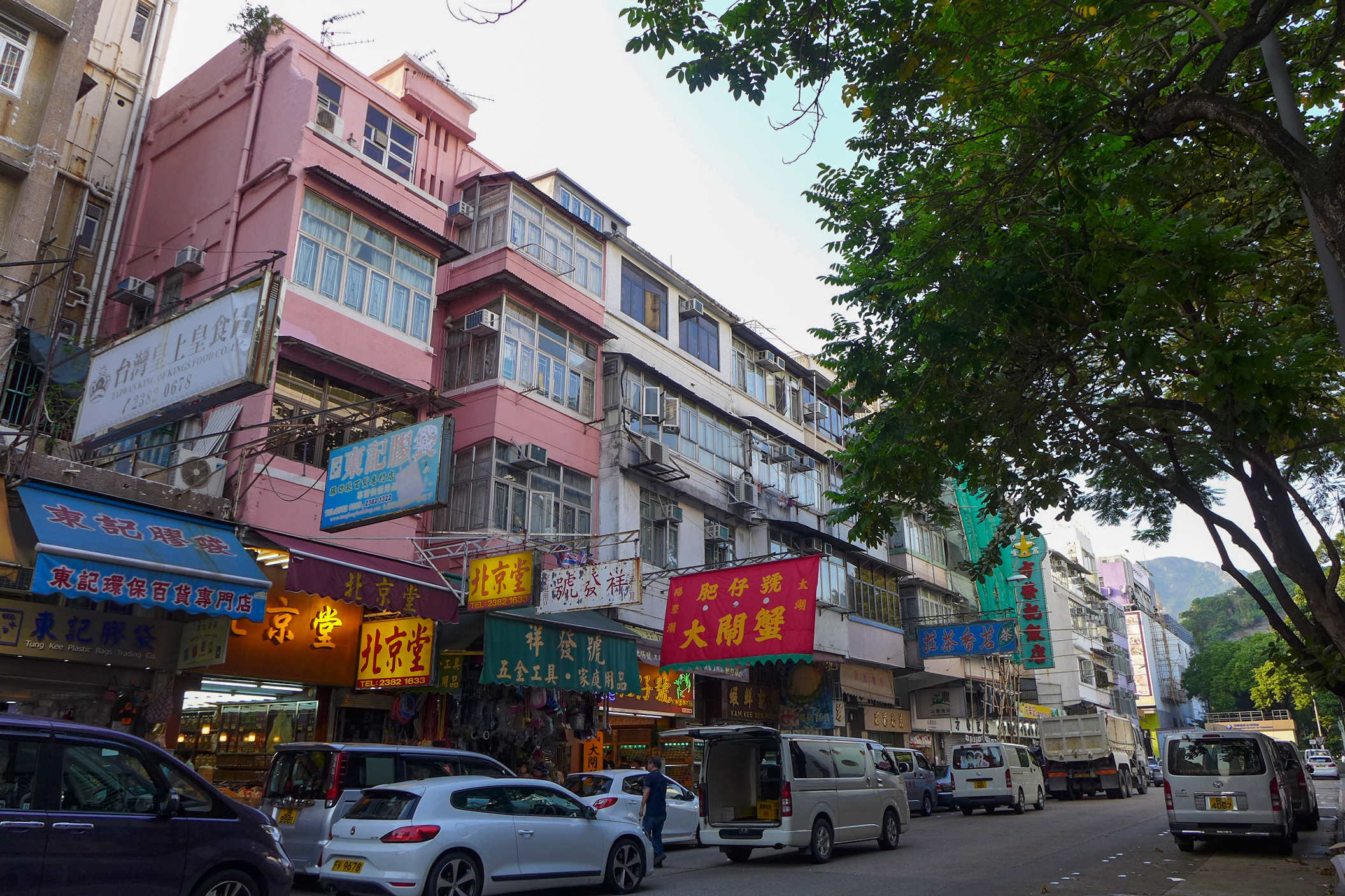 Hau Wong Road